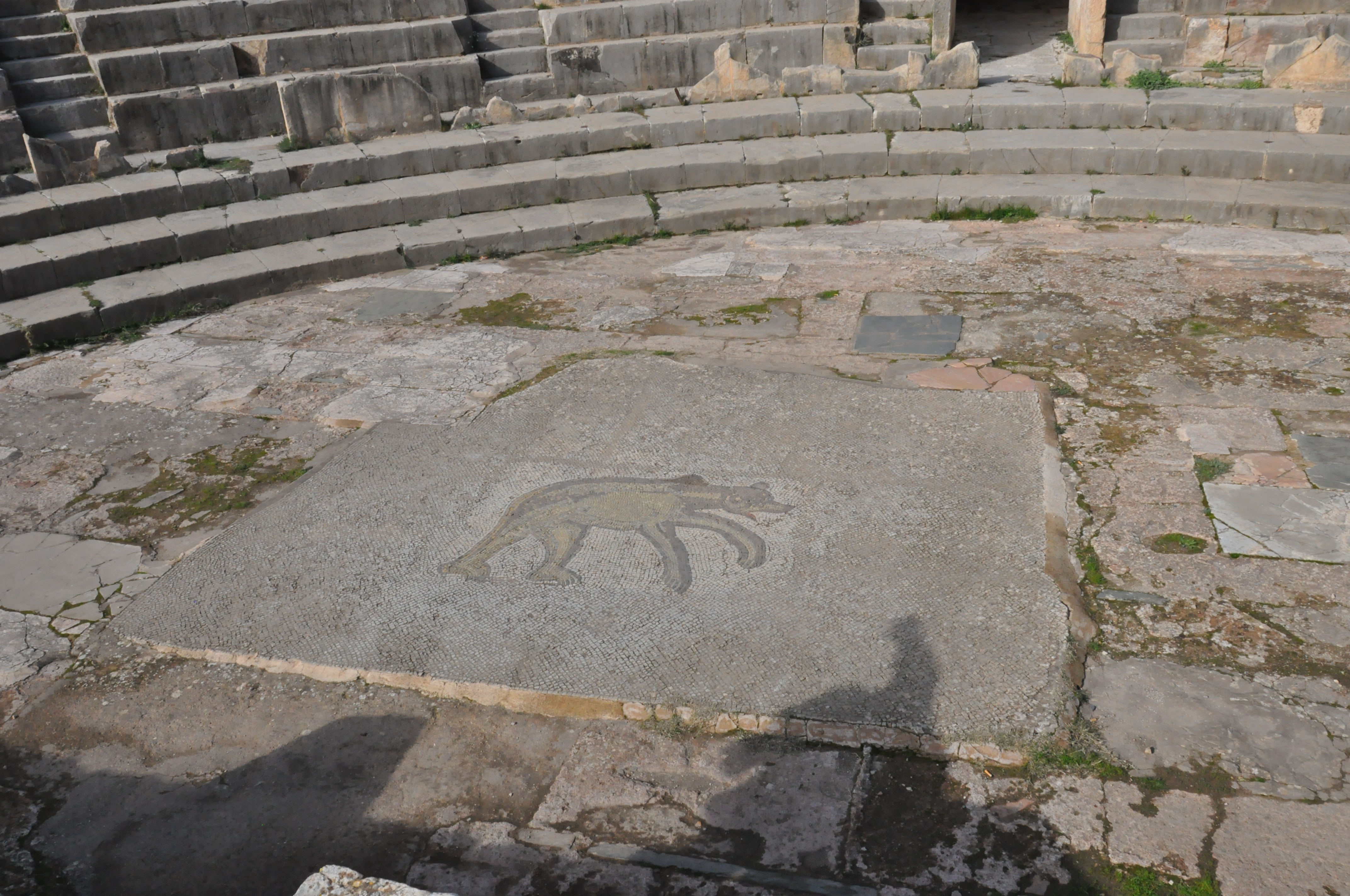 Théâtre de Bulla Regia